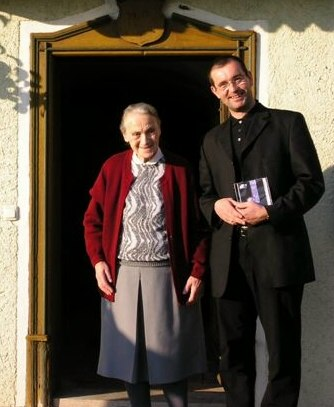 Thomas Schlager-Weidinger mit Franziska Jaegerstaetter im Nov 2003